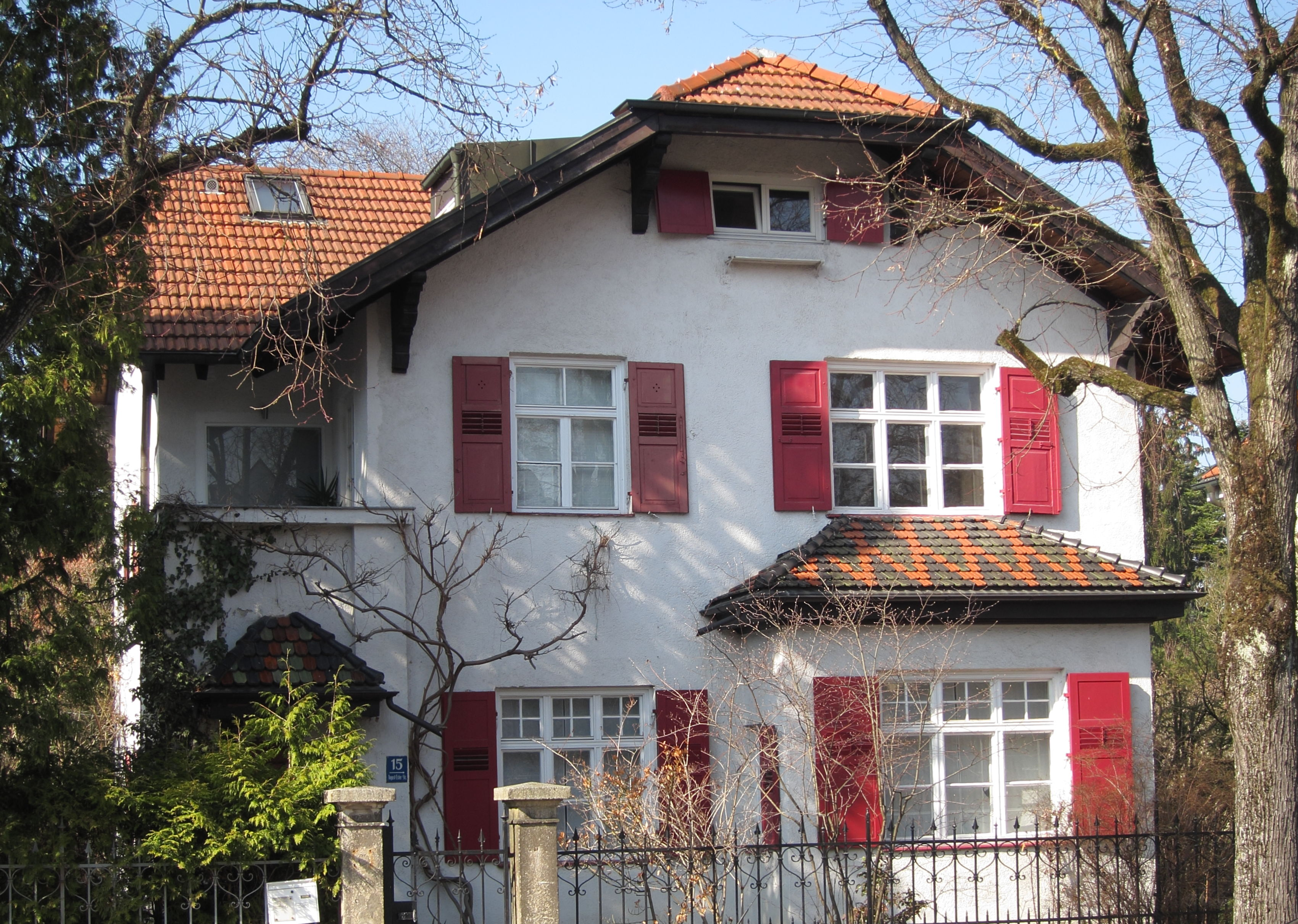 August-Exter-Straße 15; Villa, Landhausstil, um 1895 aus dem Büro August Exter.